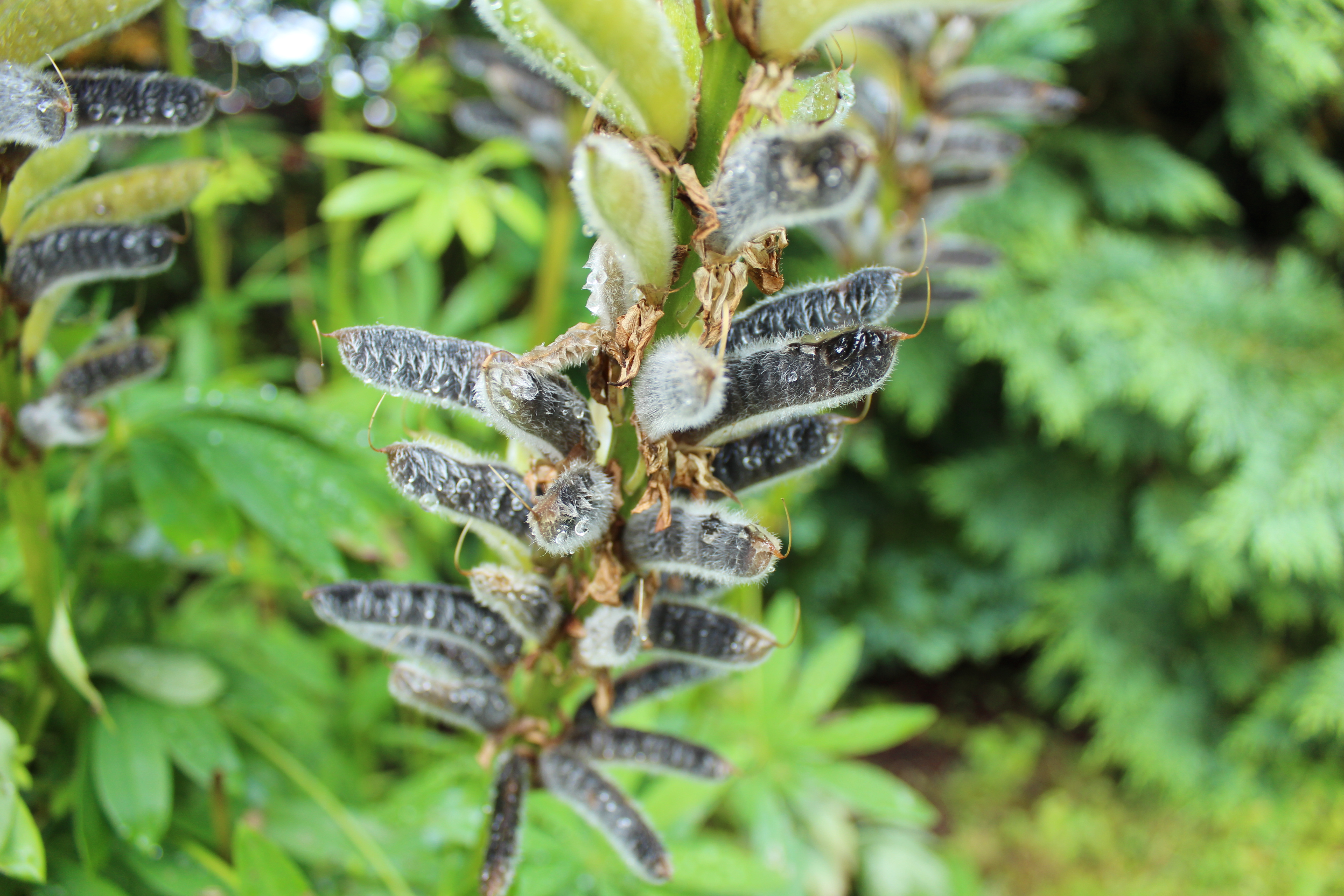 Hagelupinens karakteristiske utsende på sensommeren 2012